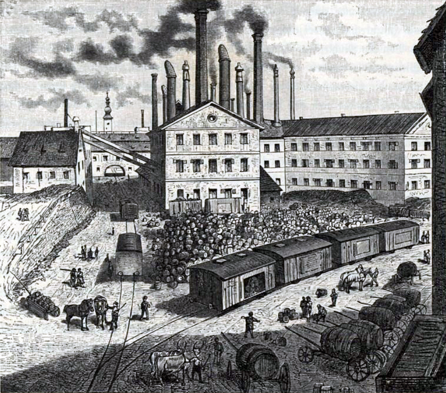 Niederösterreich, Schwechat, Brauerei